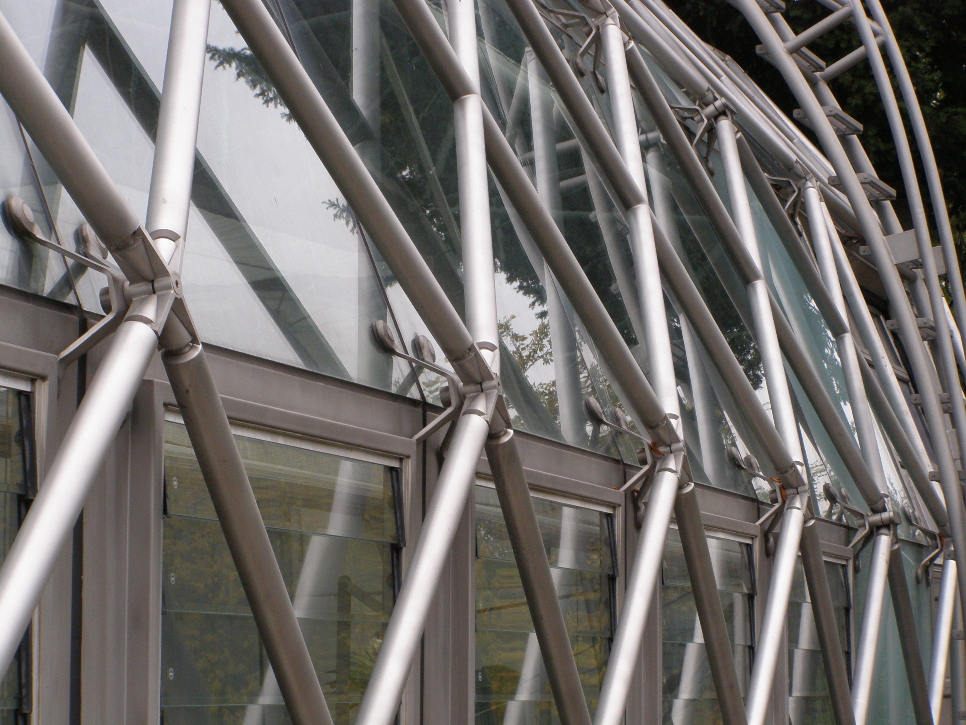 Pražský hrad, Královská zahrada, Oranžérie